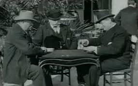 Partie de cartes